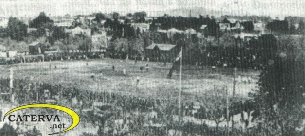 Imagen del estadio Villa Peñarol, propiedad del CURCC, ubicado en la zona de Casavalle.